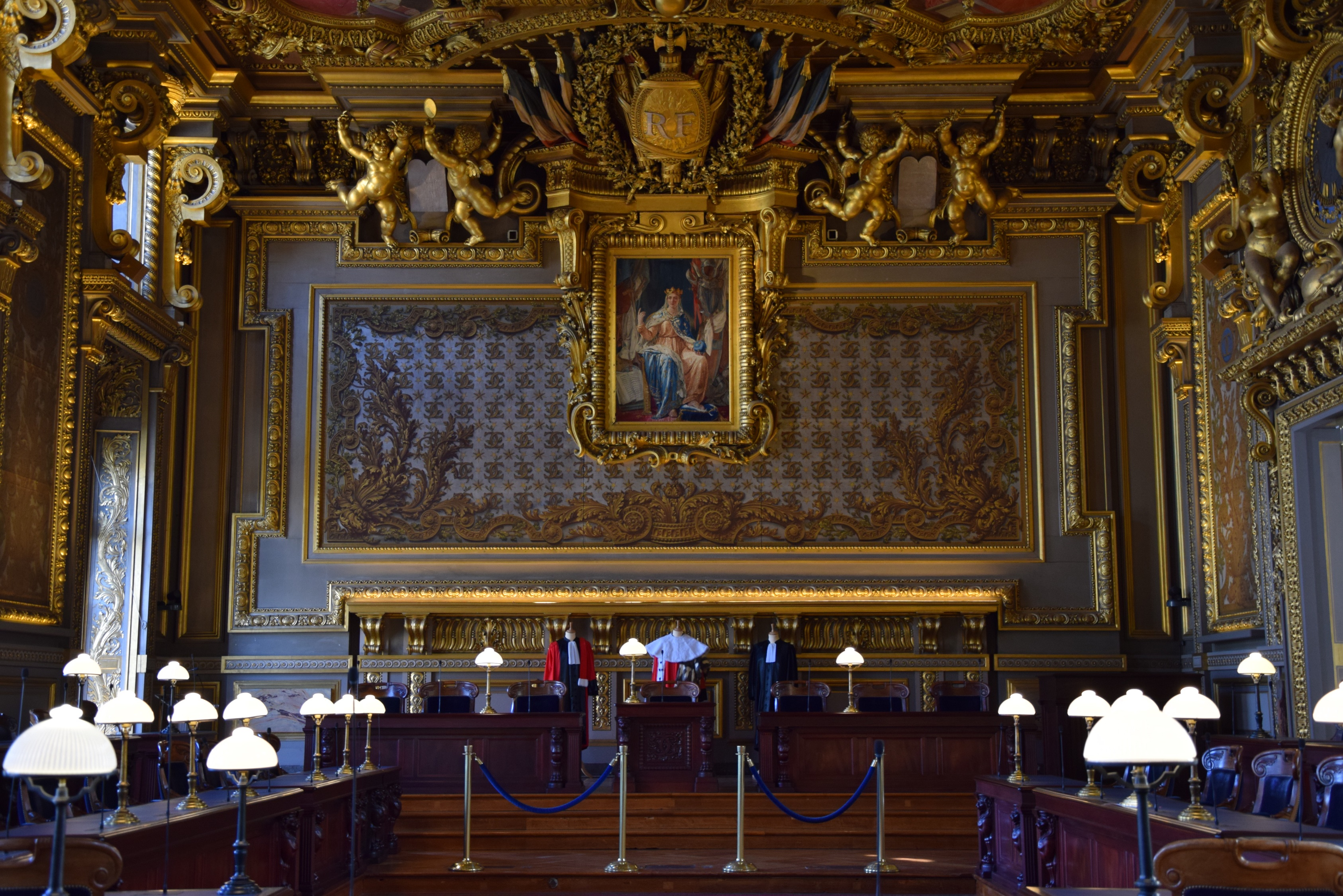 Salle d'audience de la première chambre civile de la Cour de cassation. premier étage de la Cour de cassation au palais de justice de Paris. .